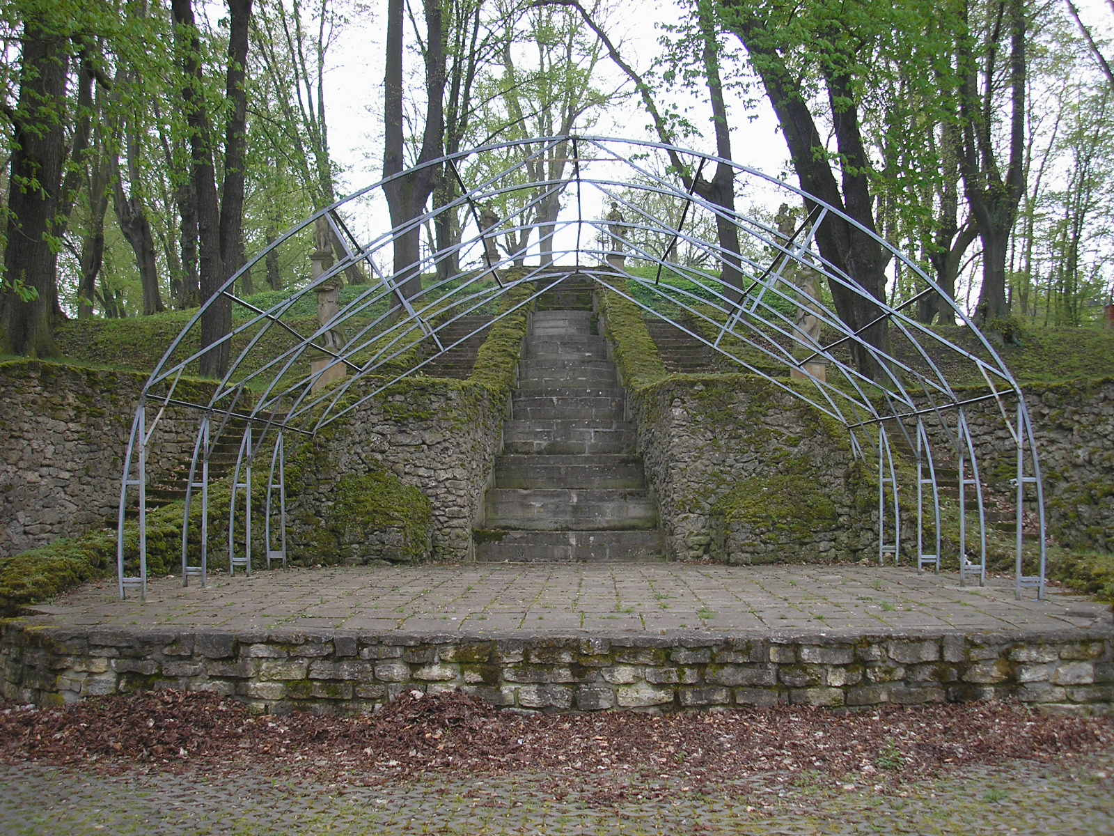 Die (nicht funktionstüchtige) große Wasserkunst im Schlosspark in Ebeleben (Thüringen).